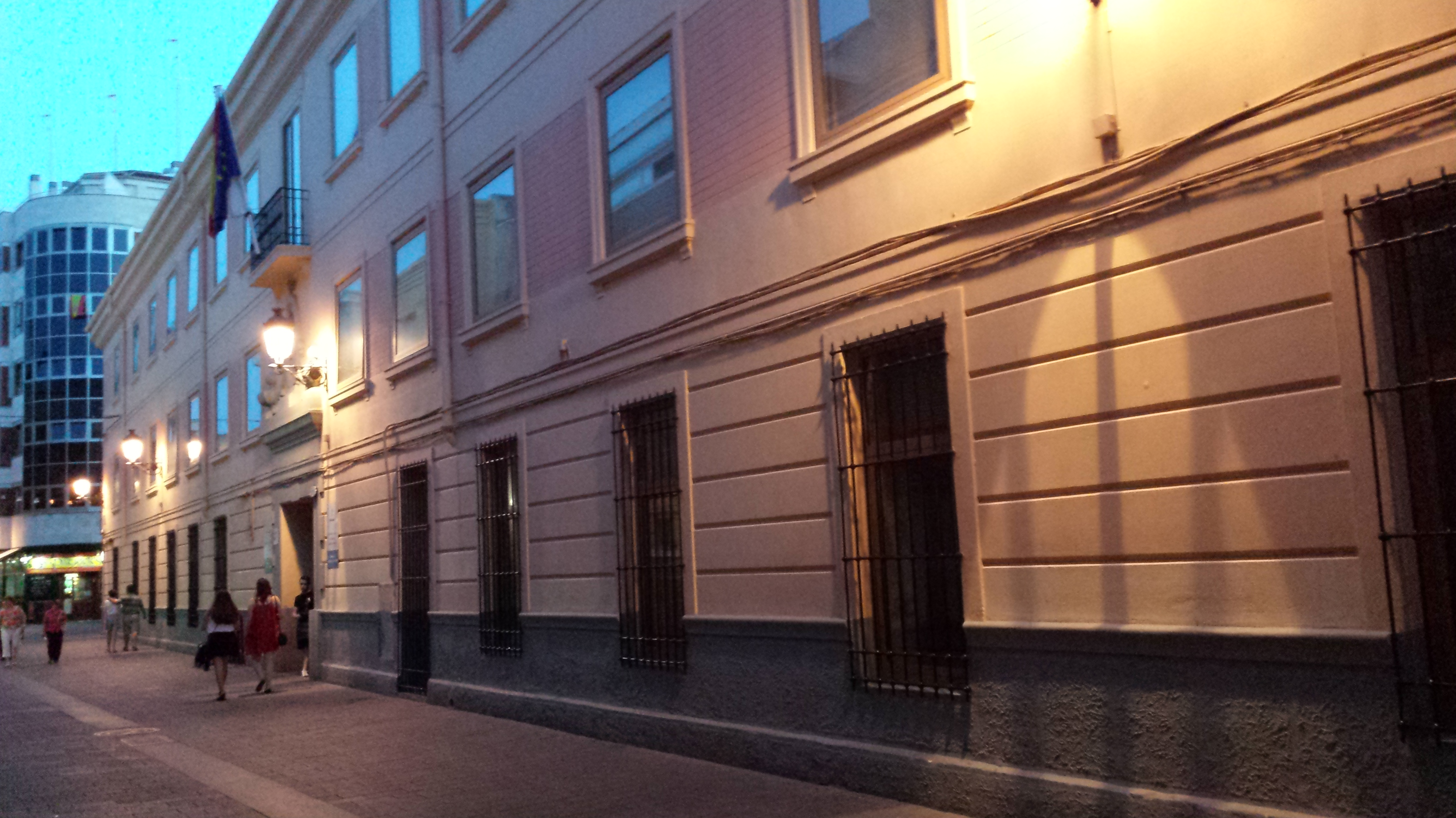 Conservatorio Superior de Música de Castilla-La Mancha. Conservatorio Profesional de Música Tomás de Torrejón y Velasco de Albacete. Calle Zapateros. Albacete